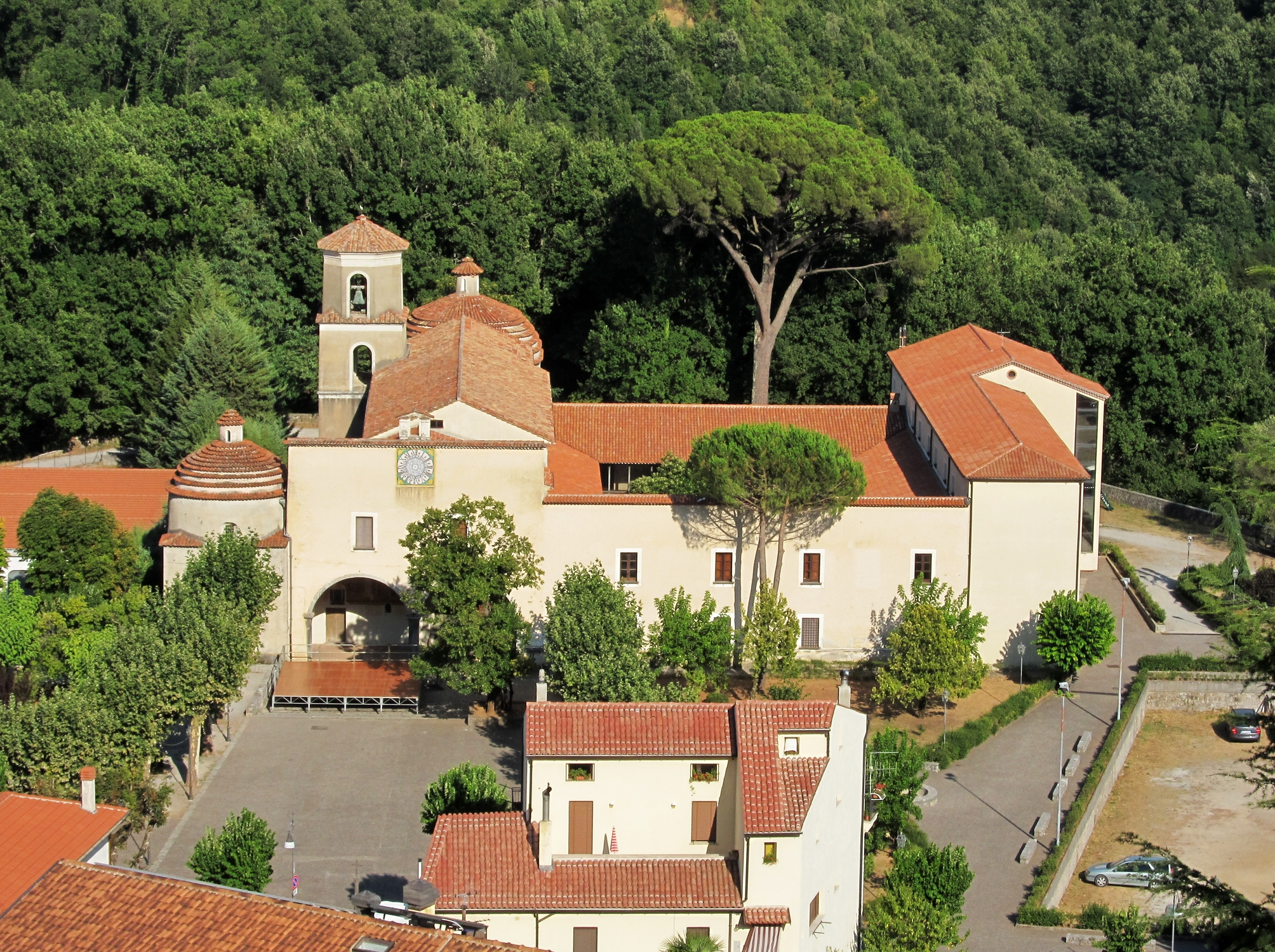 Il convento di Sant'Antonio a Rivello (Basilicata).